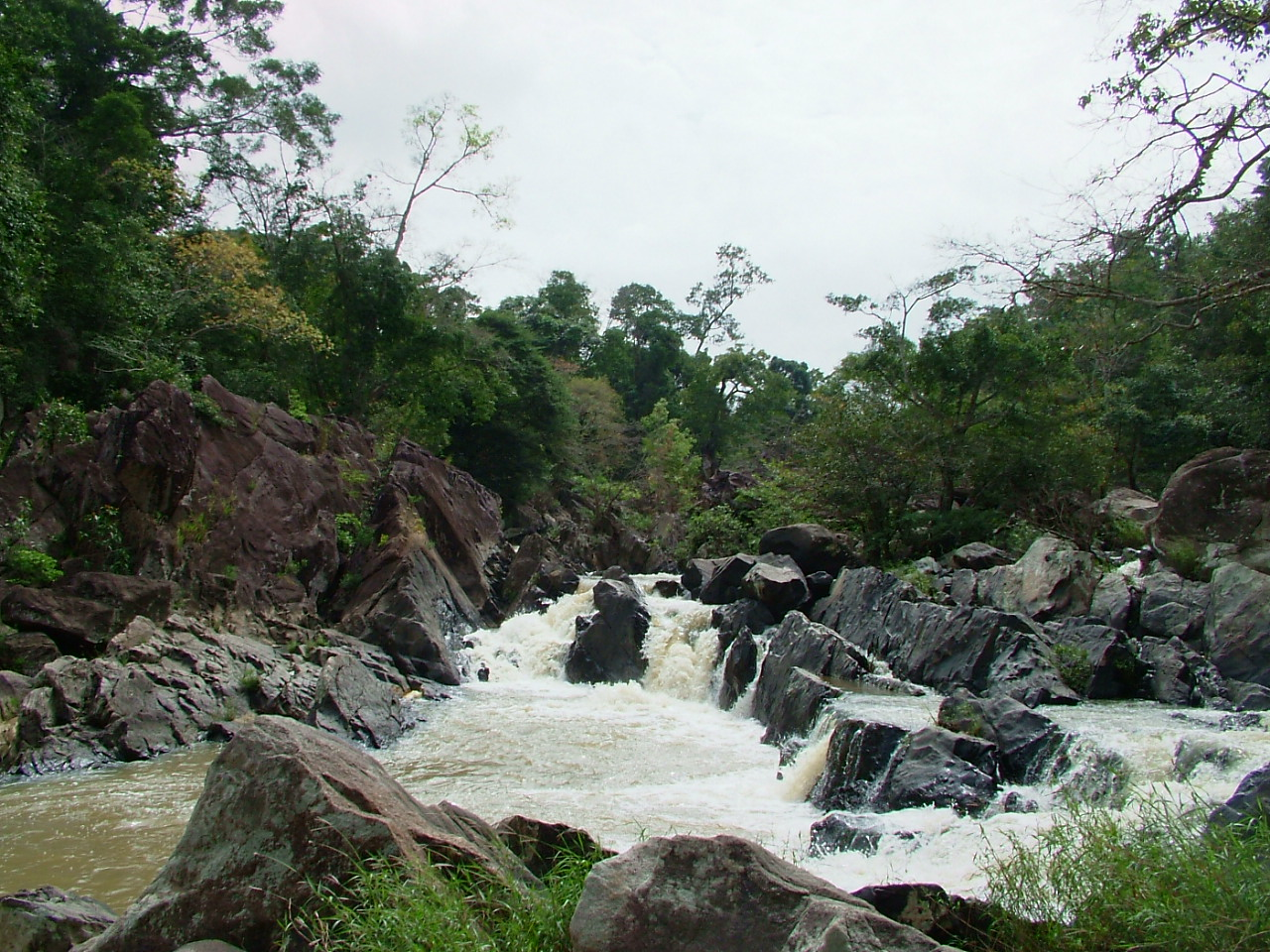 Tác giả: Đỗ Tuấn Hưng. Nguồn: Ảnh tự chụp. Nội dung hình: Ảnh thác Đray K'nao ở Đắk Lắk.